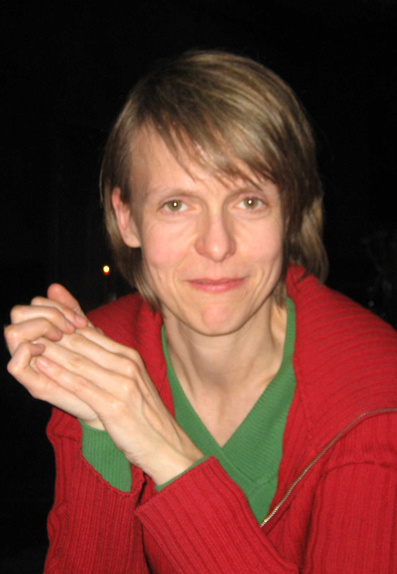 Bild von Maren-Kea Freese